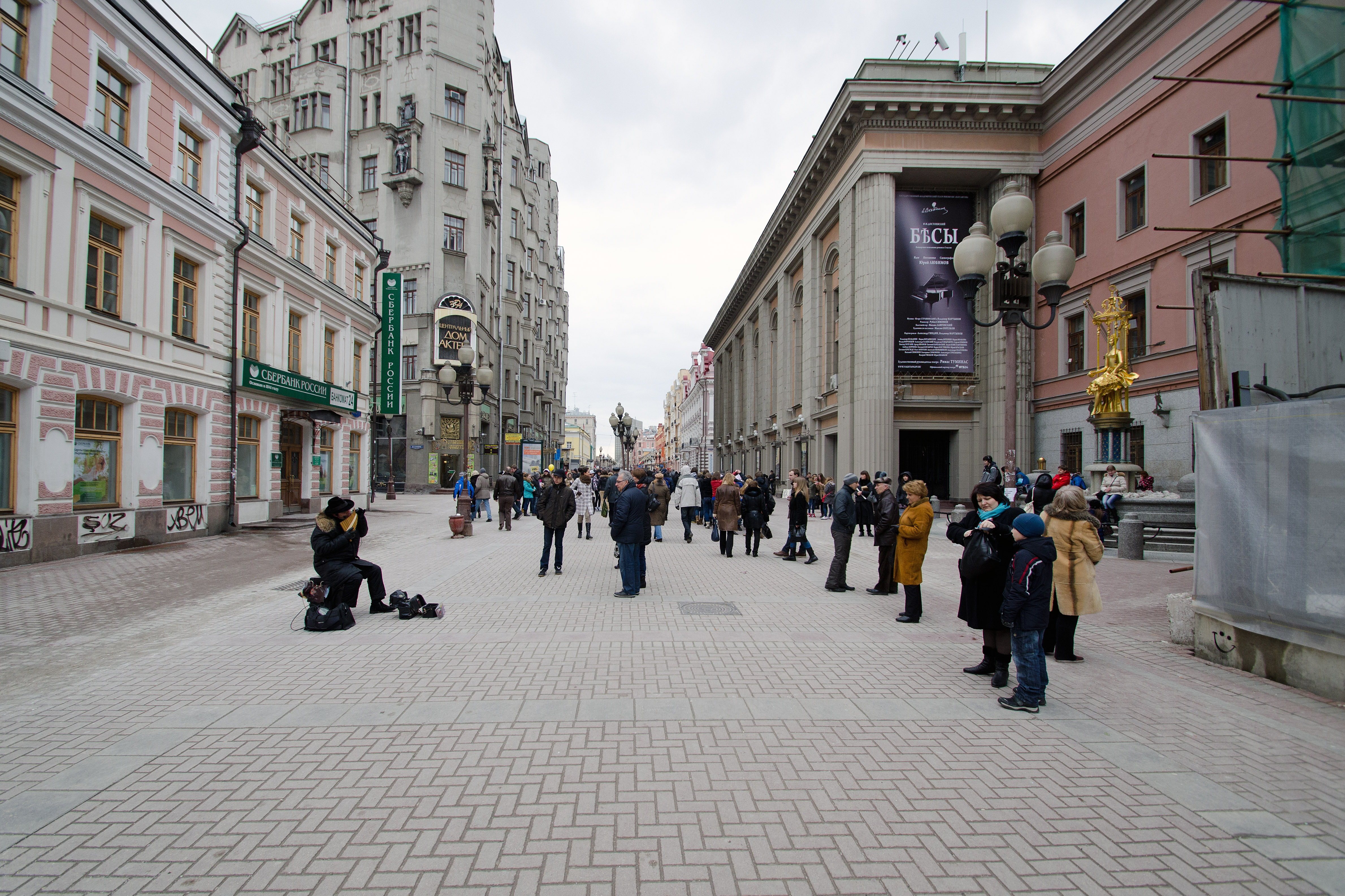 Arbat street